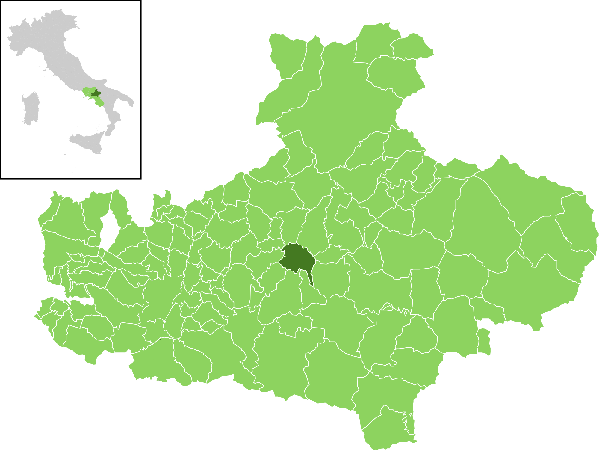 Posizione del comune all'interno della provincia di Avellino